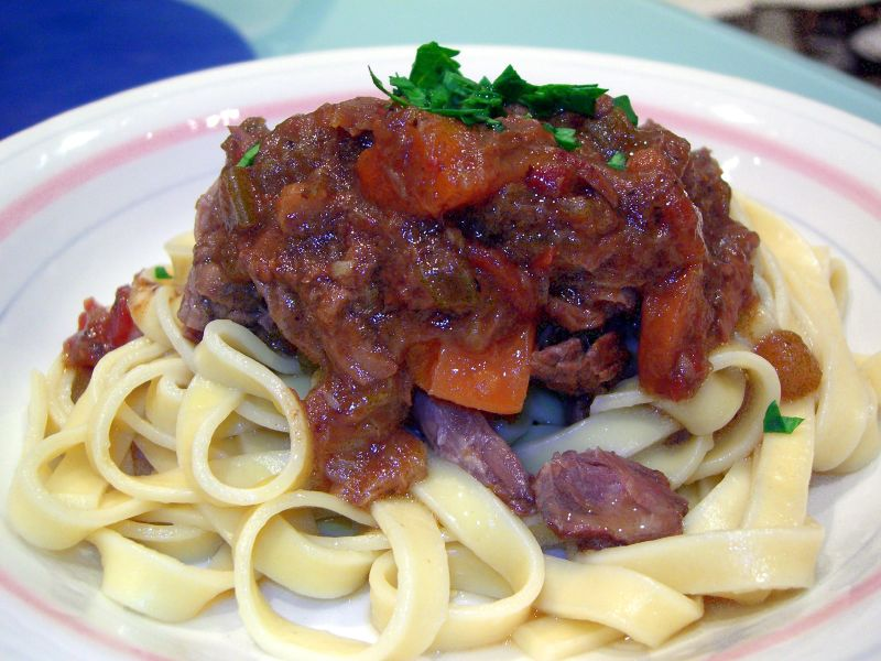 Ragoût de queue de boeuf et pâtes aux œufs